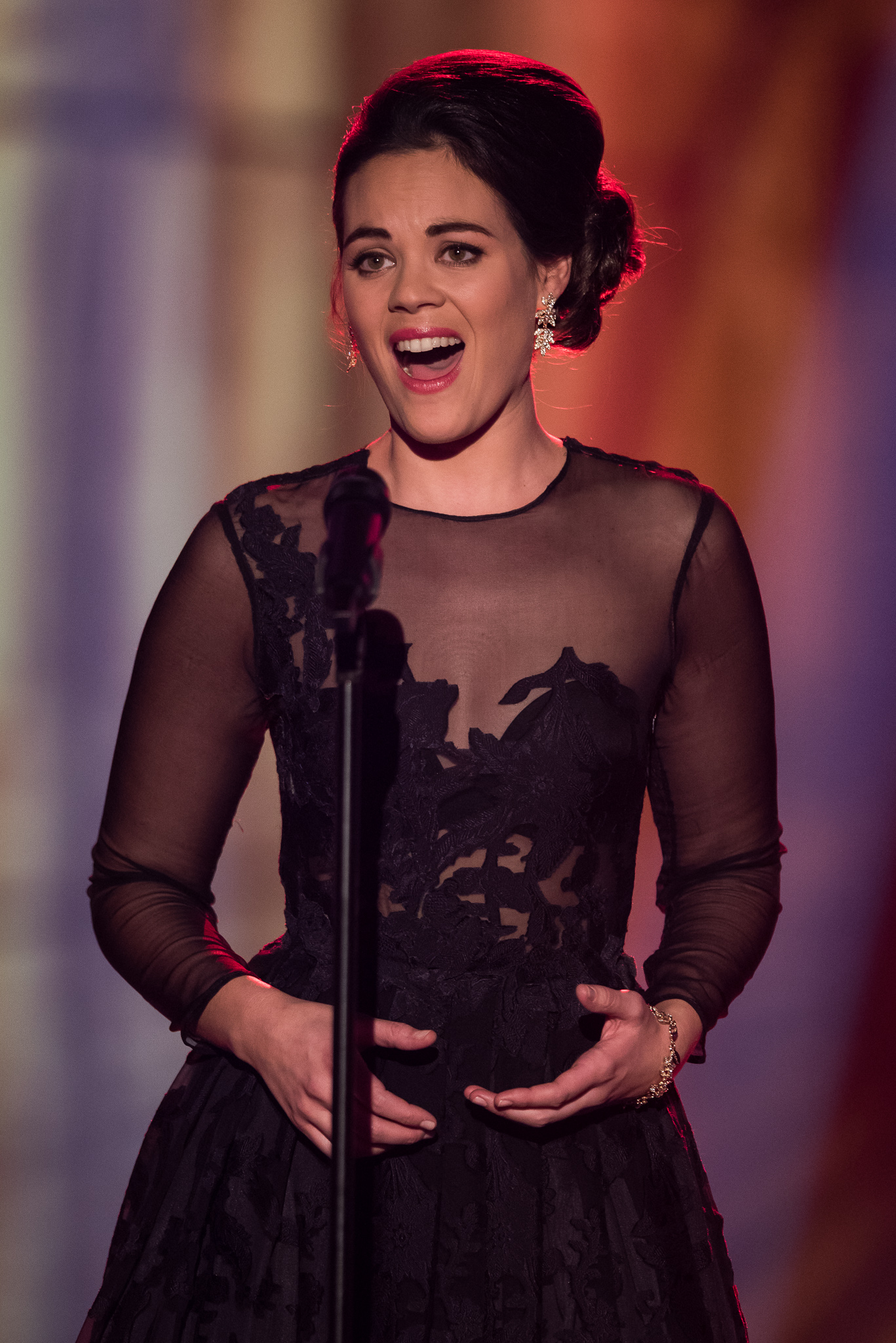 BR,Bayerisches Fernsehen,Frankenhalle,Live-Sendung,Regula Mühlemann,Sternstunden-Gala,Sternstundengala